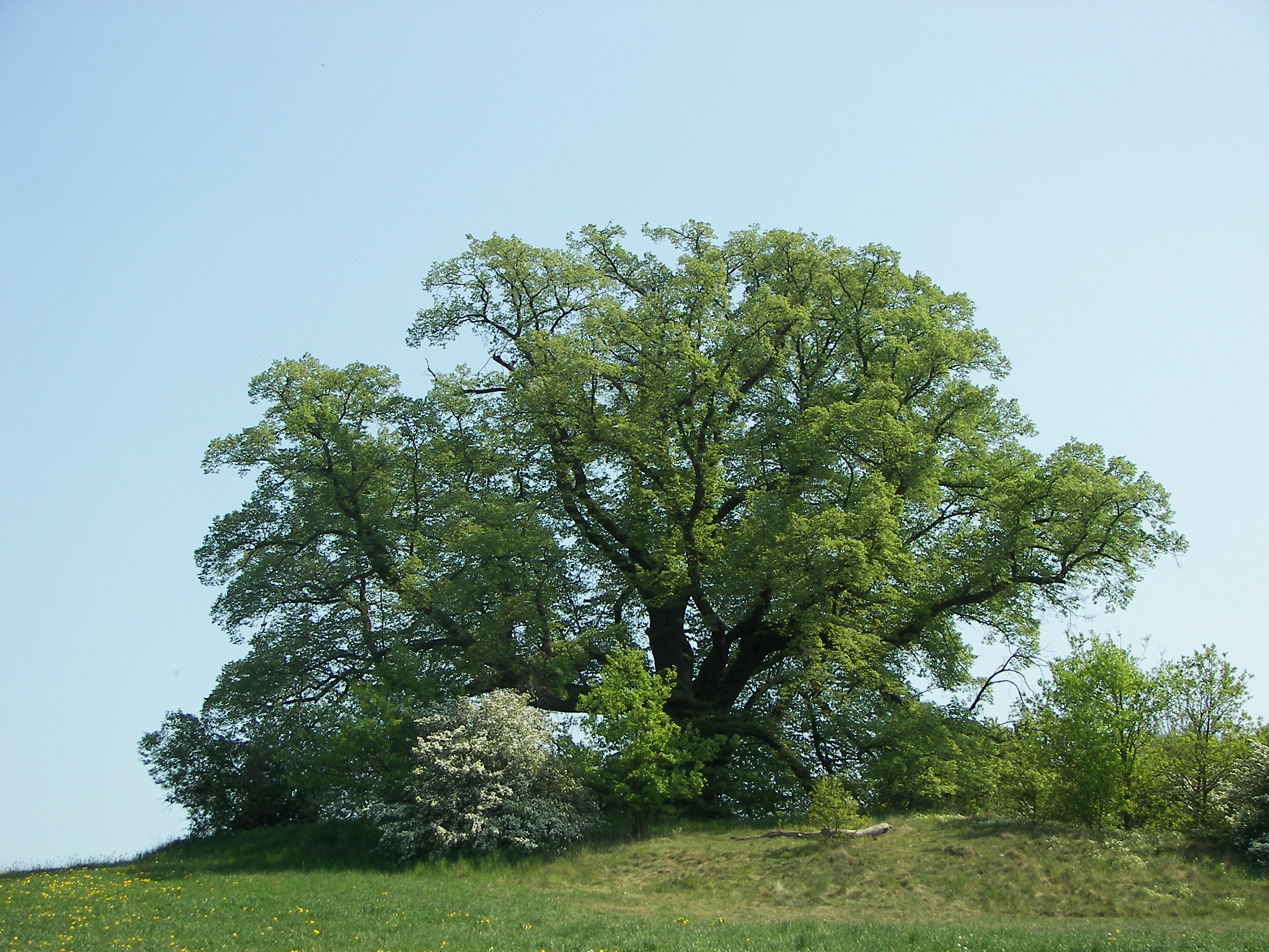 Sommerlinde (Tilia platyphyllos), „Gerichtslinde“ in Wetter-Amönau, Hessen, Deutschland